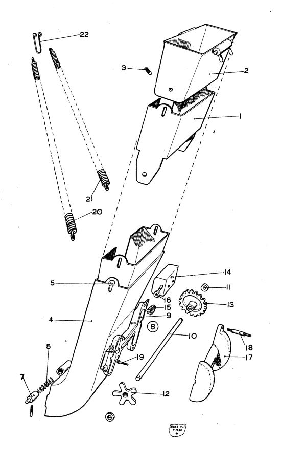 En bild på slutet av en bandledare till B 18A. Bandledaren avslutas med en patronledare som då är fast och inte ledad/rörlig.